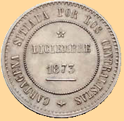 Moneda Coin